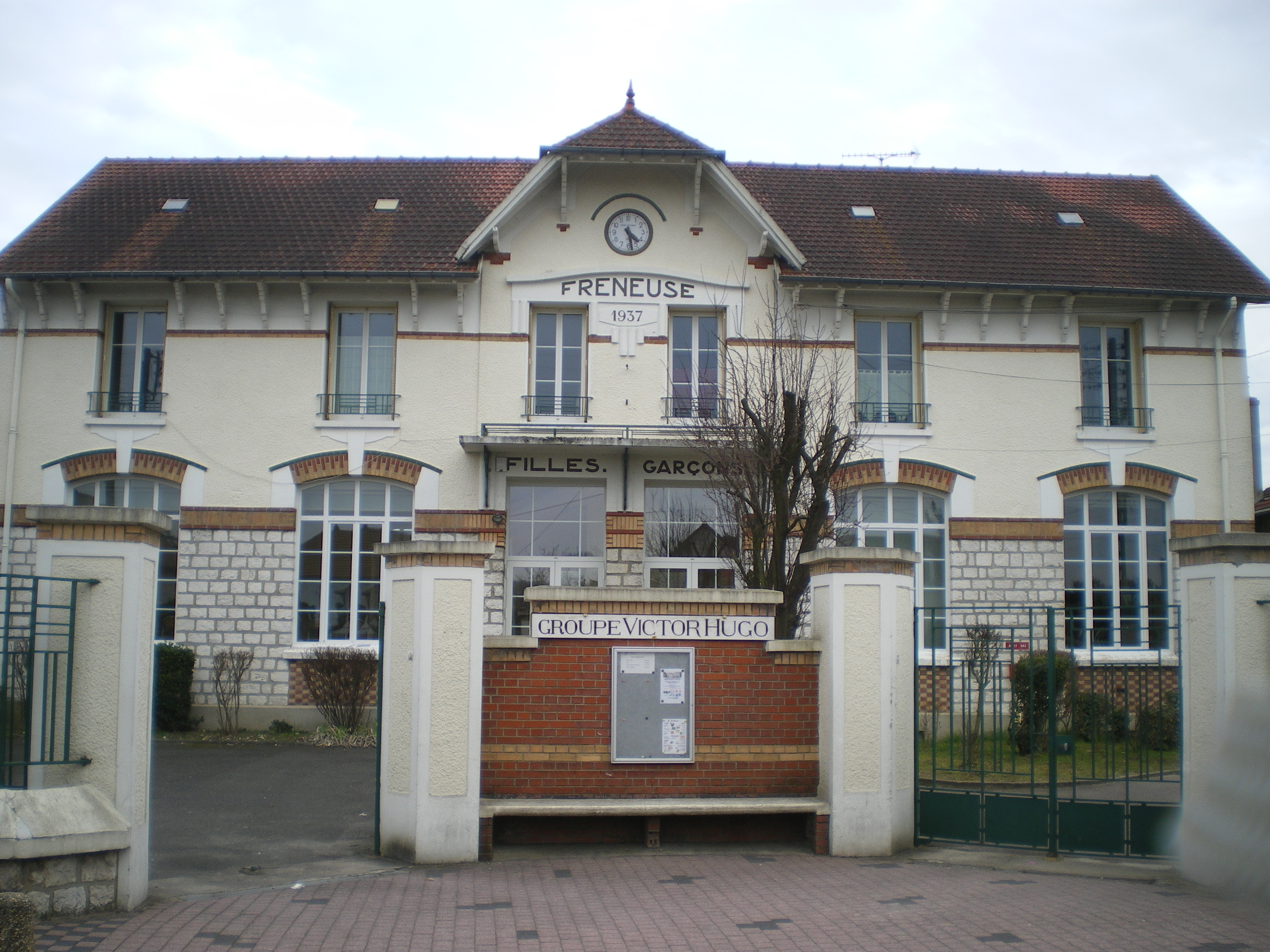 Ecole primaire Victor Hugo, Freneuse (78)